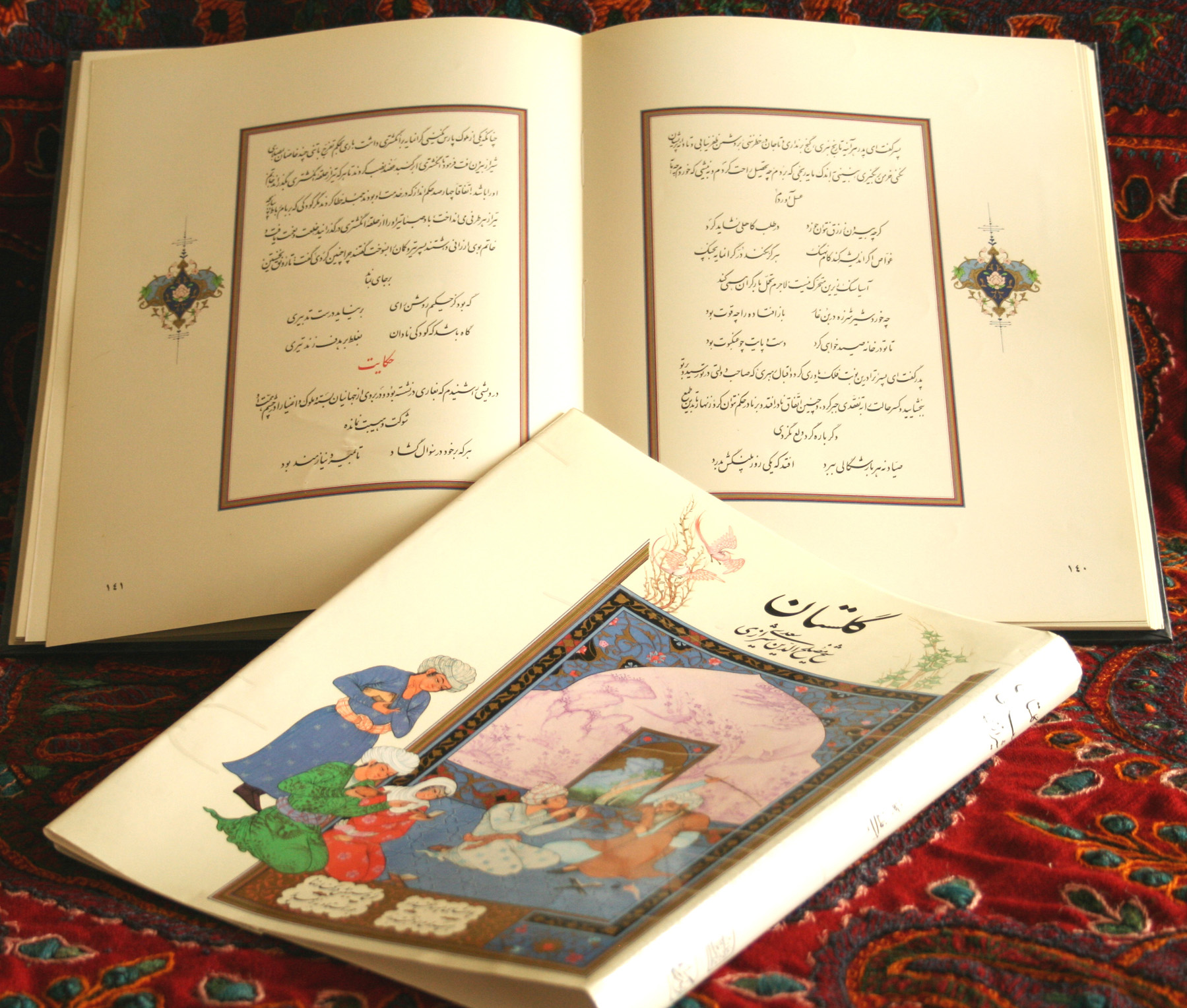 خوشنویسی گلستان سعدی به خط نستعلیق